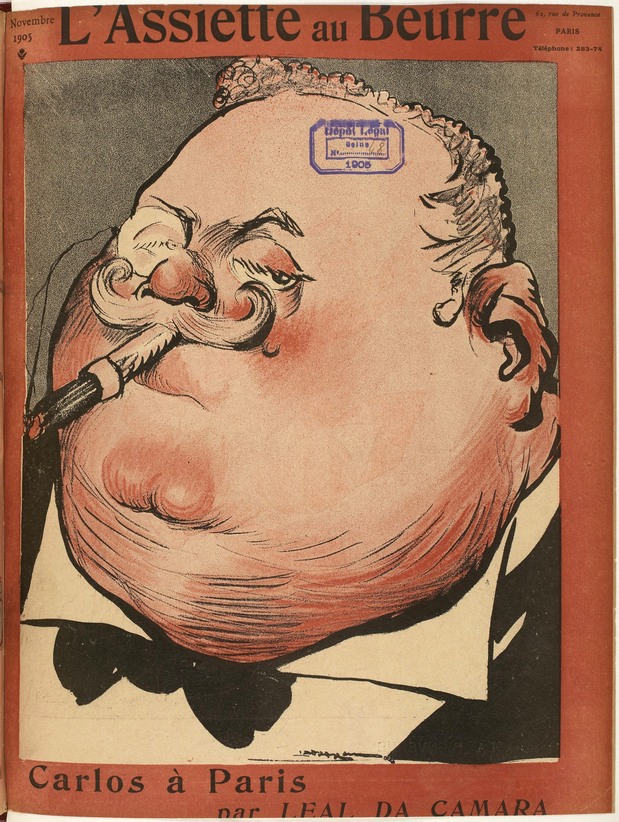 Cover.